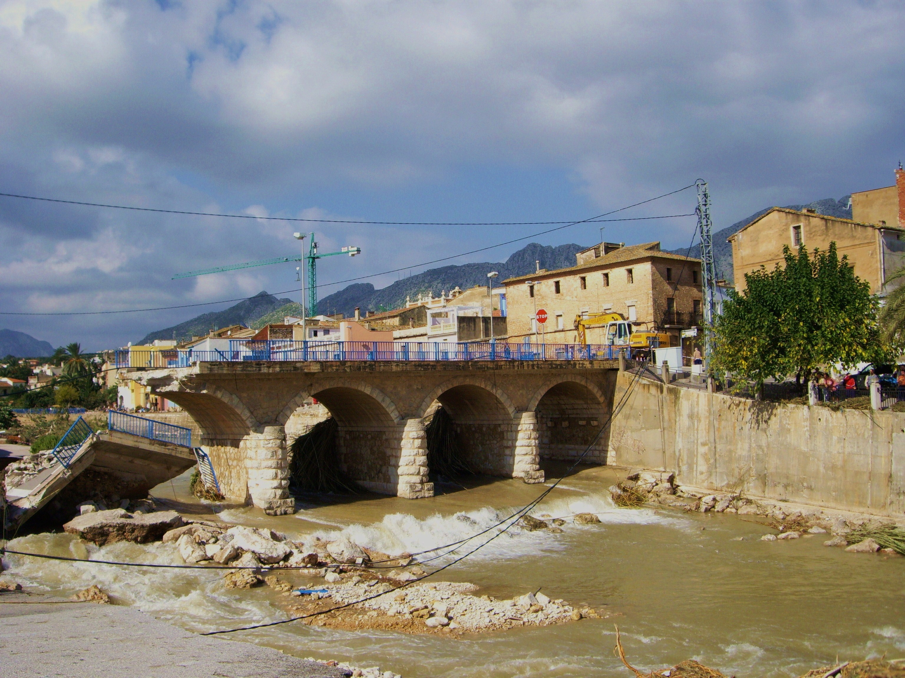 Pont caigut, Beniarbeig octubre de 2007.